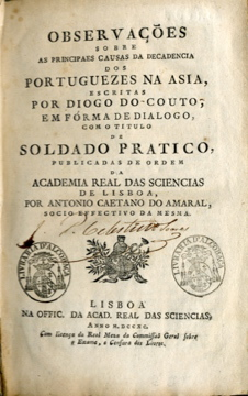 frontispice de la 1ère édition